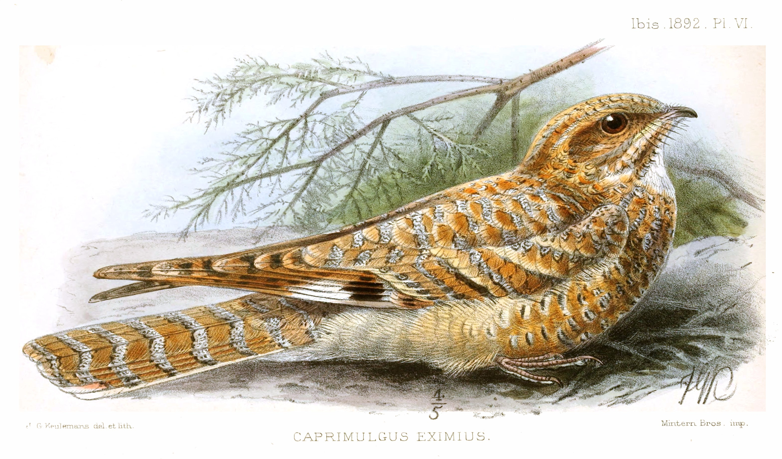 Caprimulgus eximus